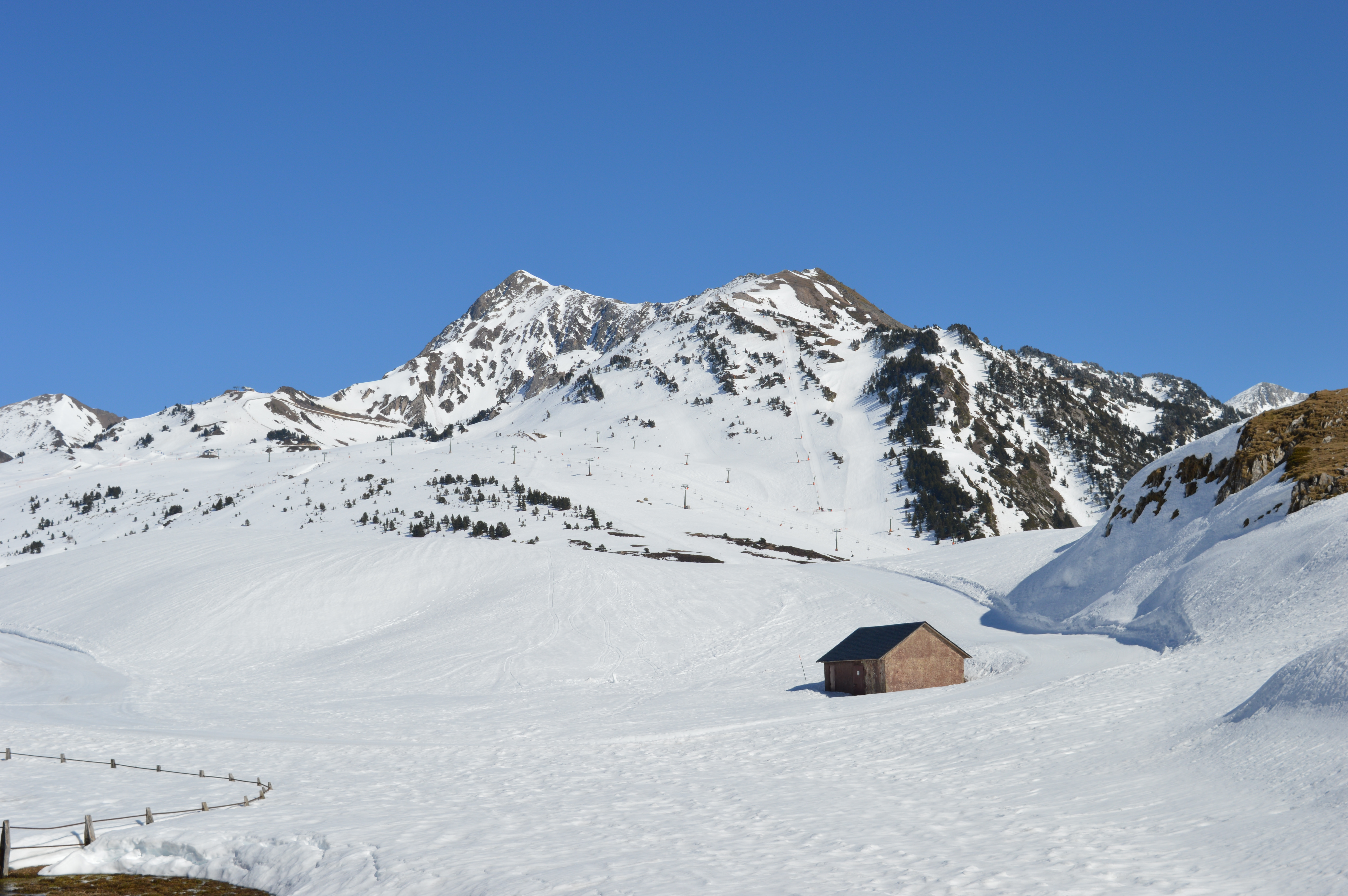 Tuc de Vacivèr e Tuc de Saumet